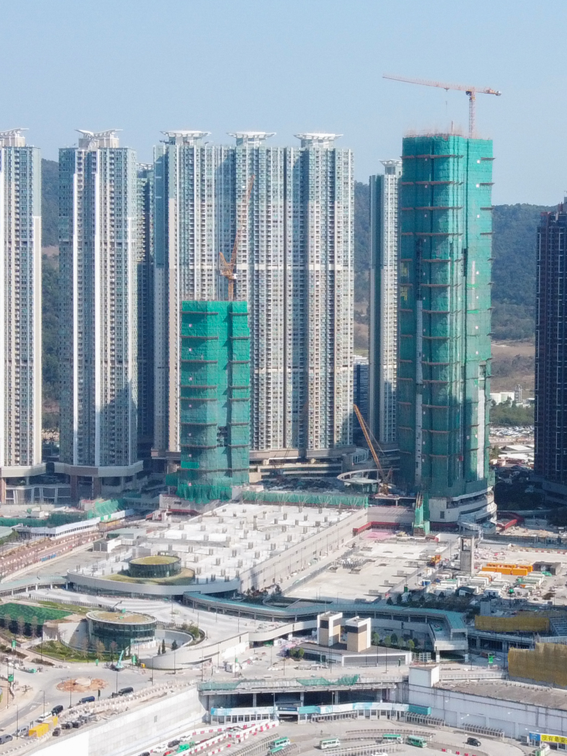 LOHAS Park Phase 7 MONTARA Site